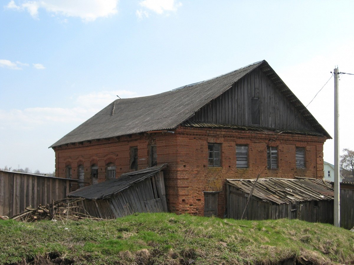 Даўгінава. Сінагога